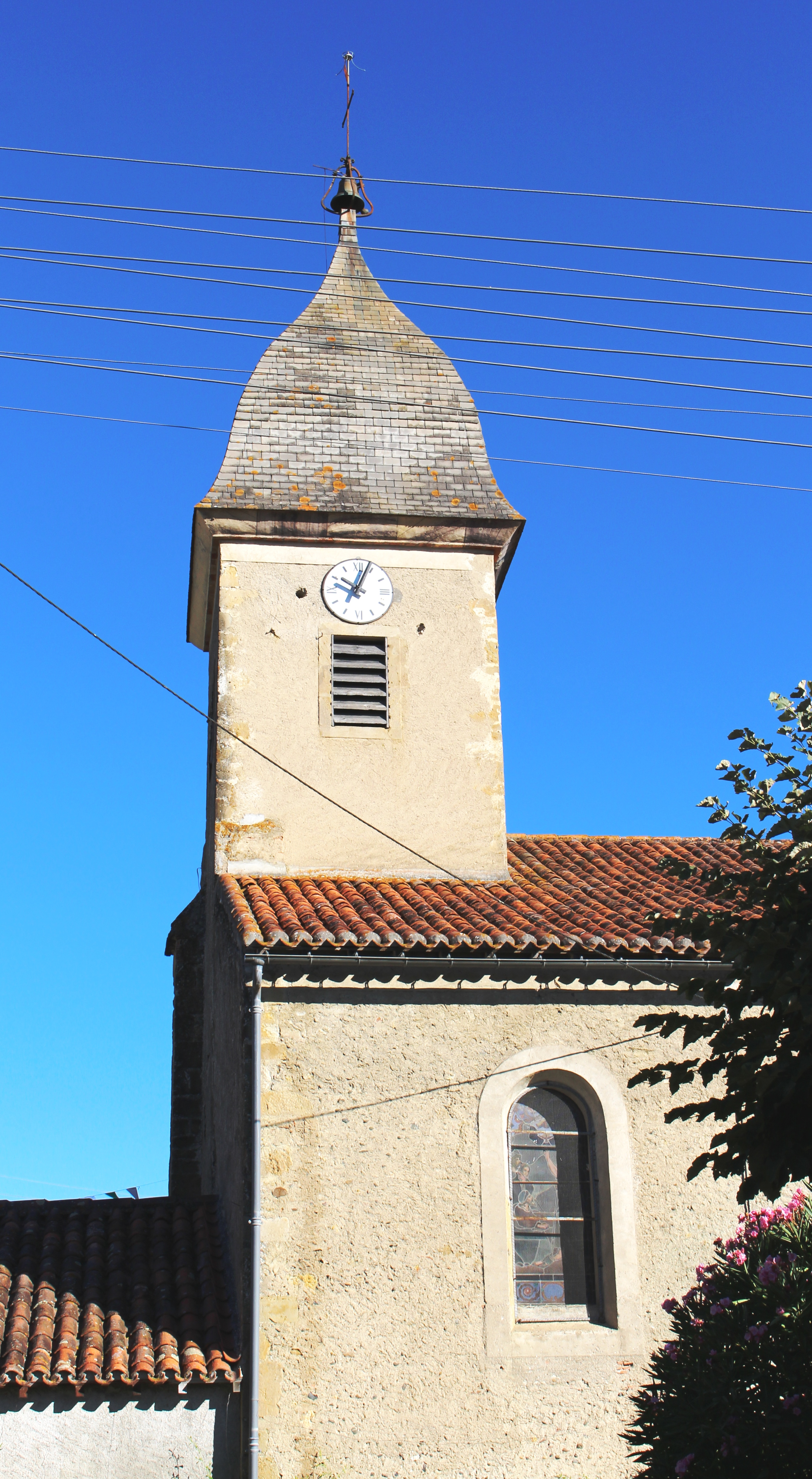 Église Saint-Jean-Baptiste de Hères (Hautes-Pyrénées)